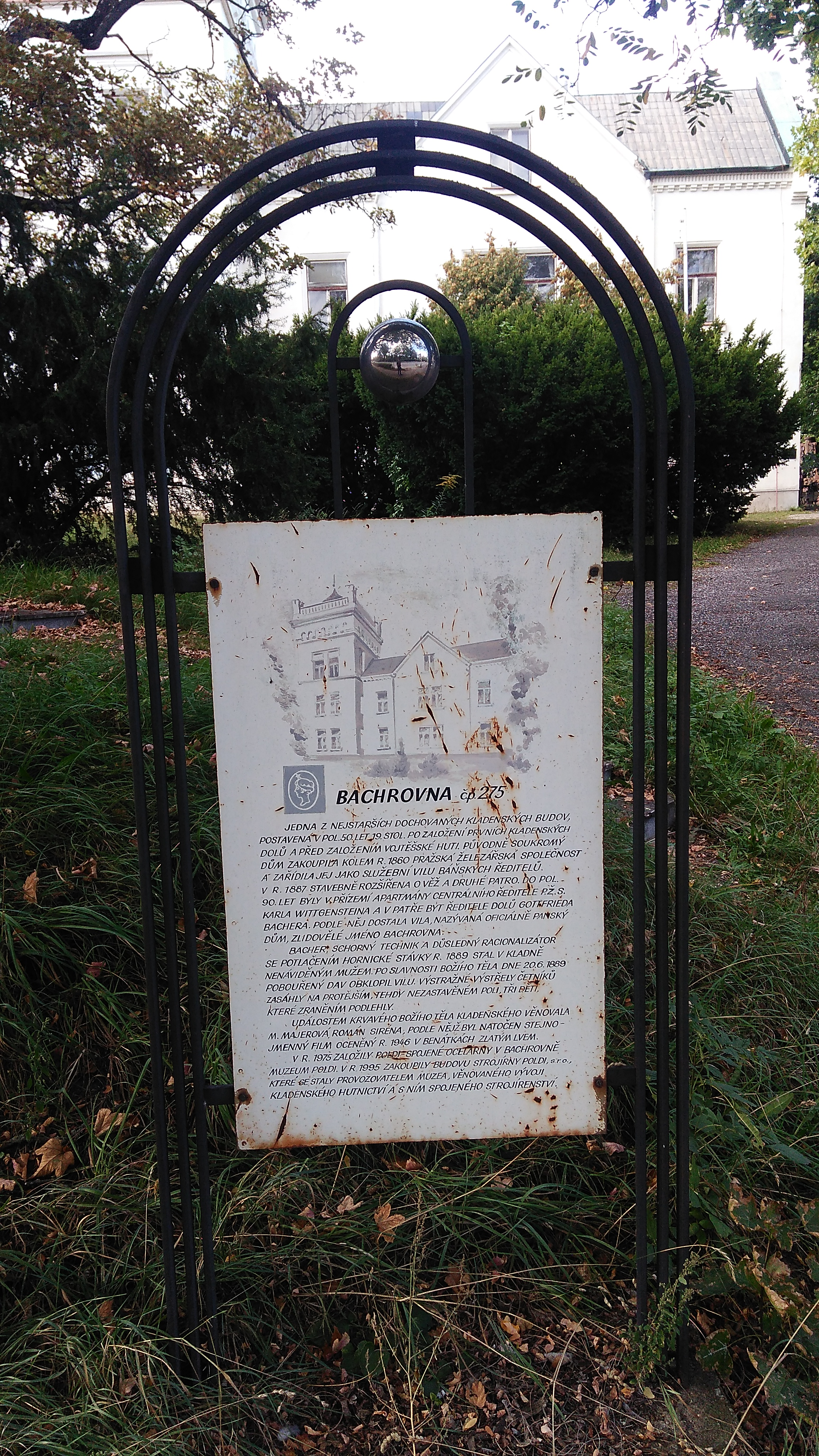 cedule před Bachrovnou v Kladně